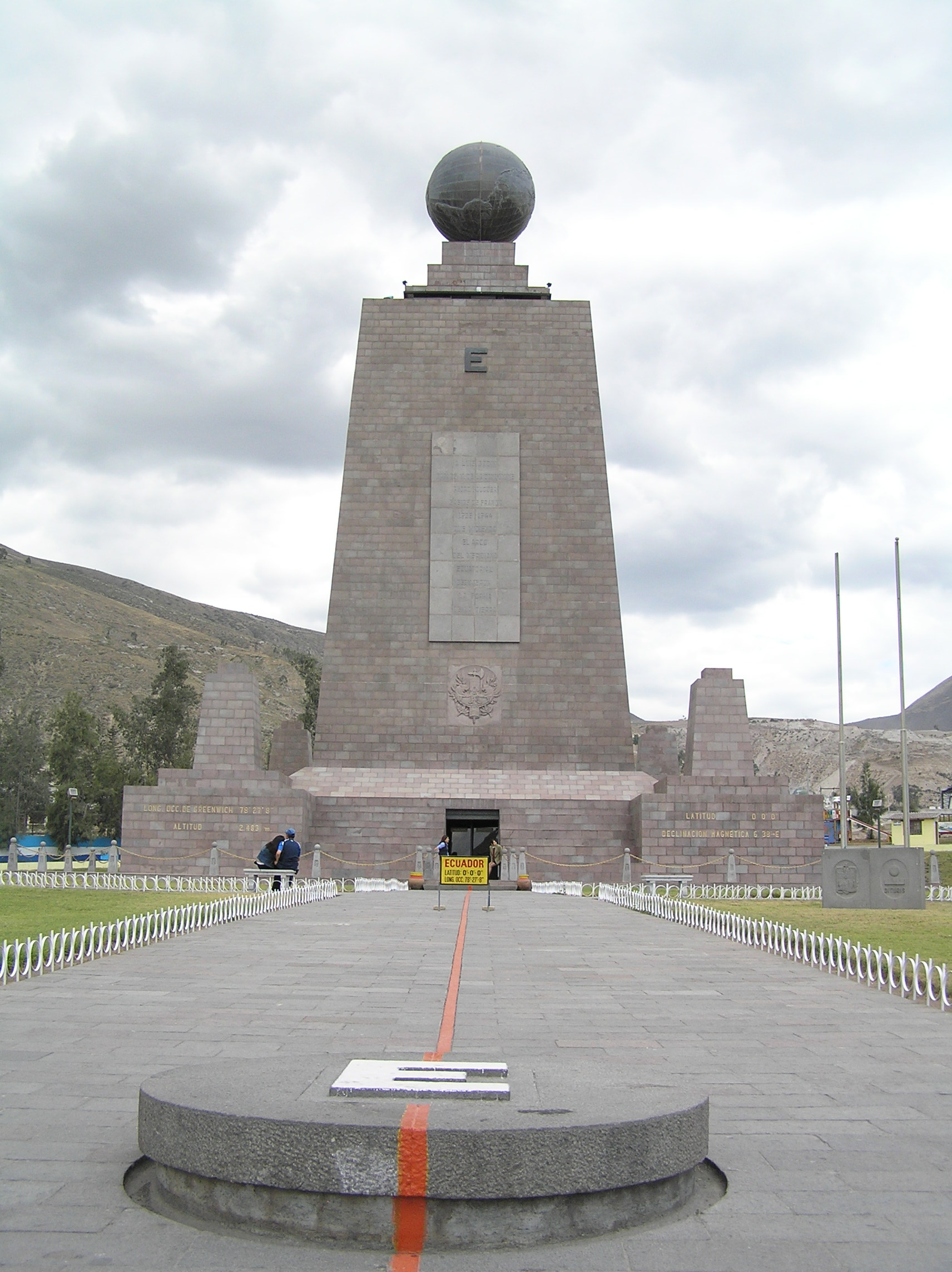 Monumento a la Mitad del Mundo (vista desde el Este)